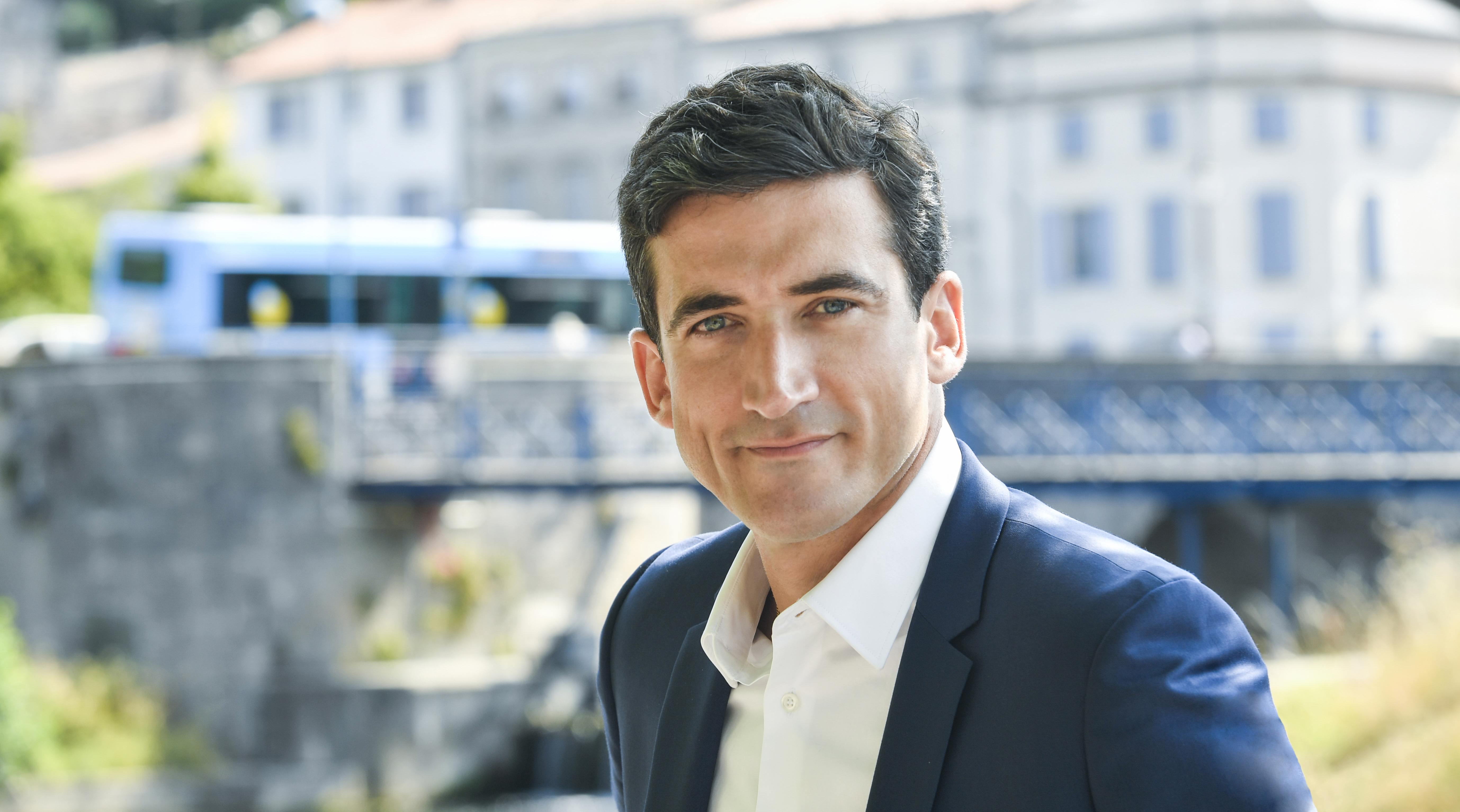 Portrait de Jérôme Baloge président de NiortAgglo